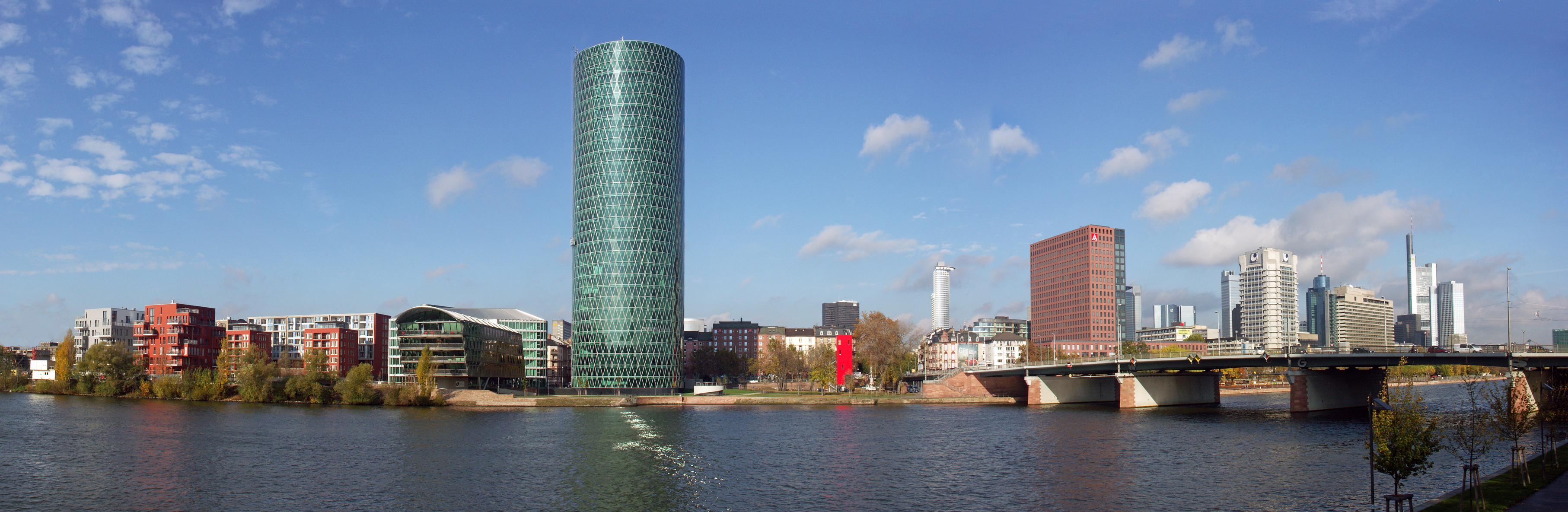 Frankfurt am Main, Friedensbrücke und Westhafenbebauung Frankfurt am Main, Friedensbrücke and Westhafen buildings